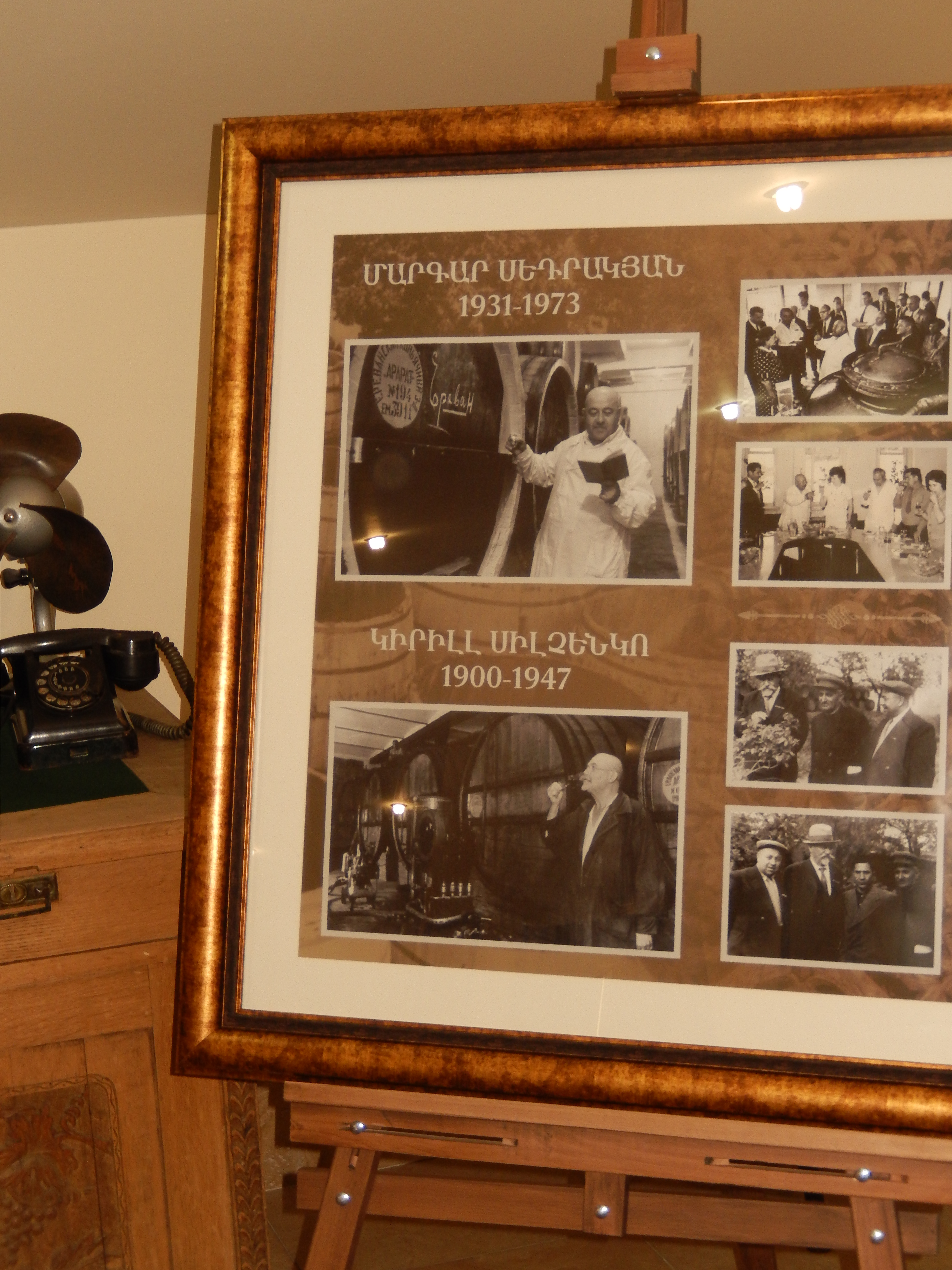 Գործարանի համալիր. Շուստովի (Թաիրյանի) Գինու-կոնյակի գործարանը 6/7.1